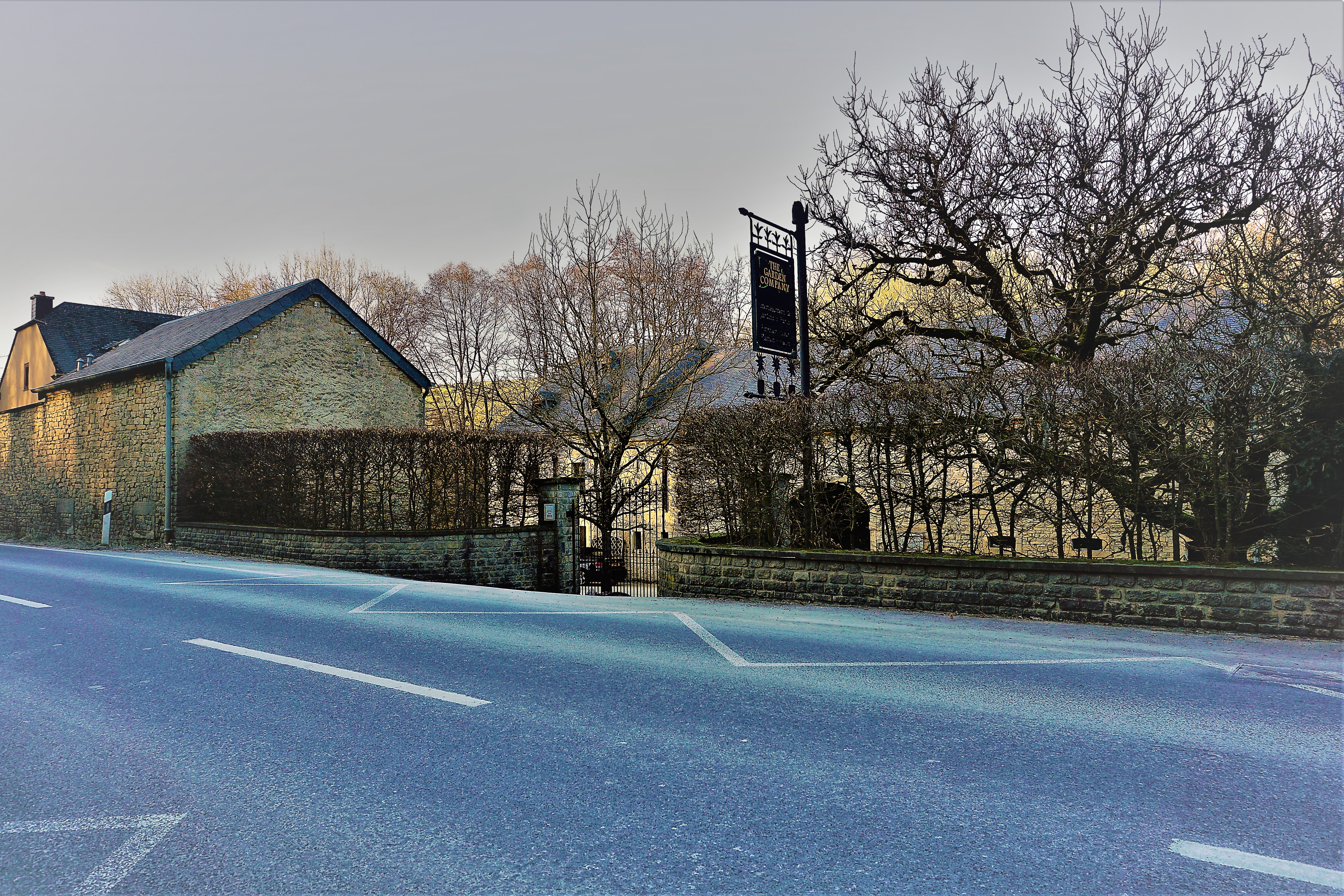 Klosmillen, commune de Biwer.